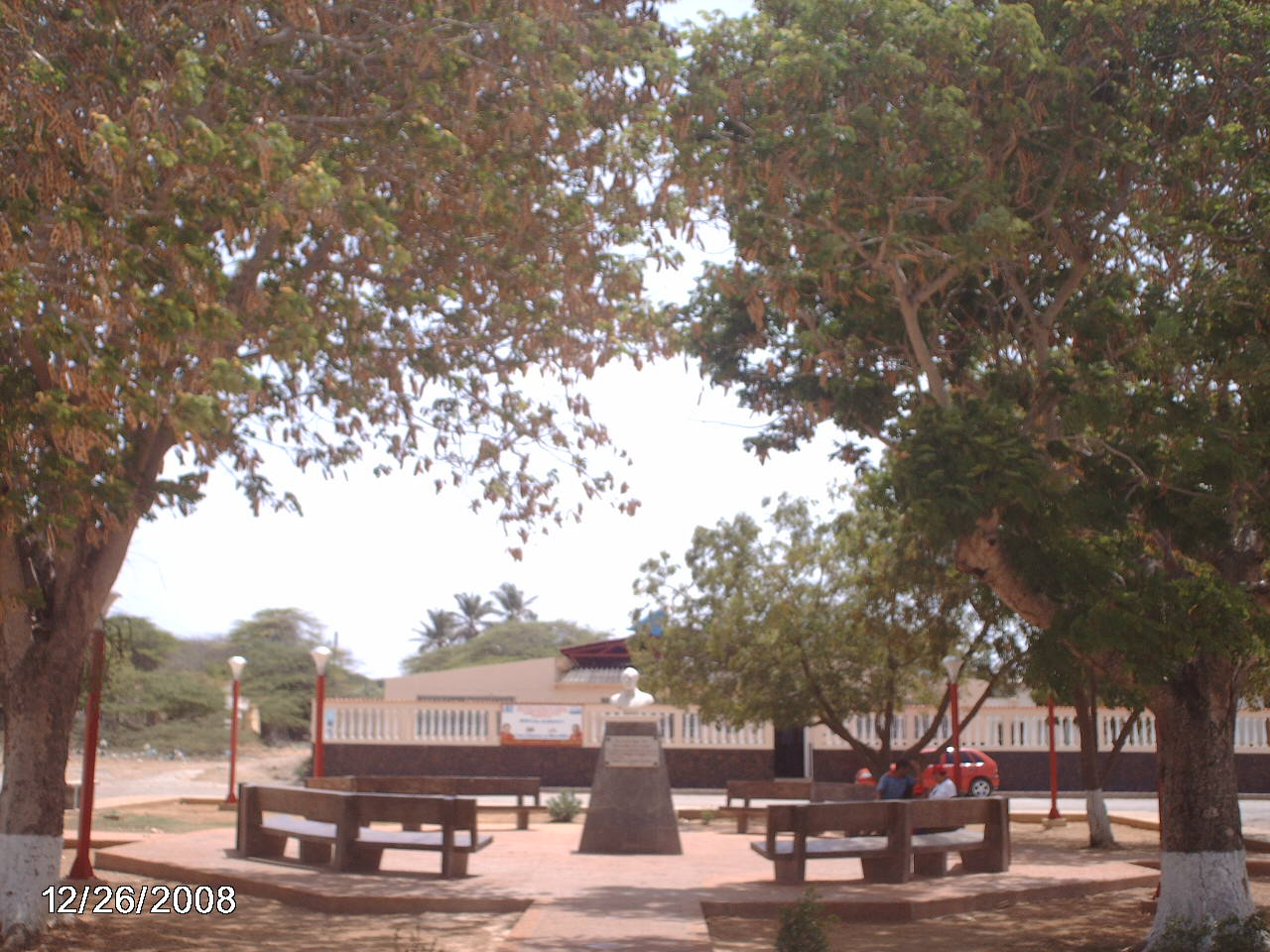 Plaza de Miraca.